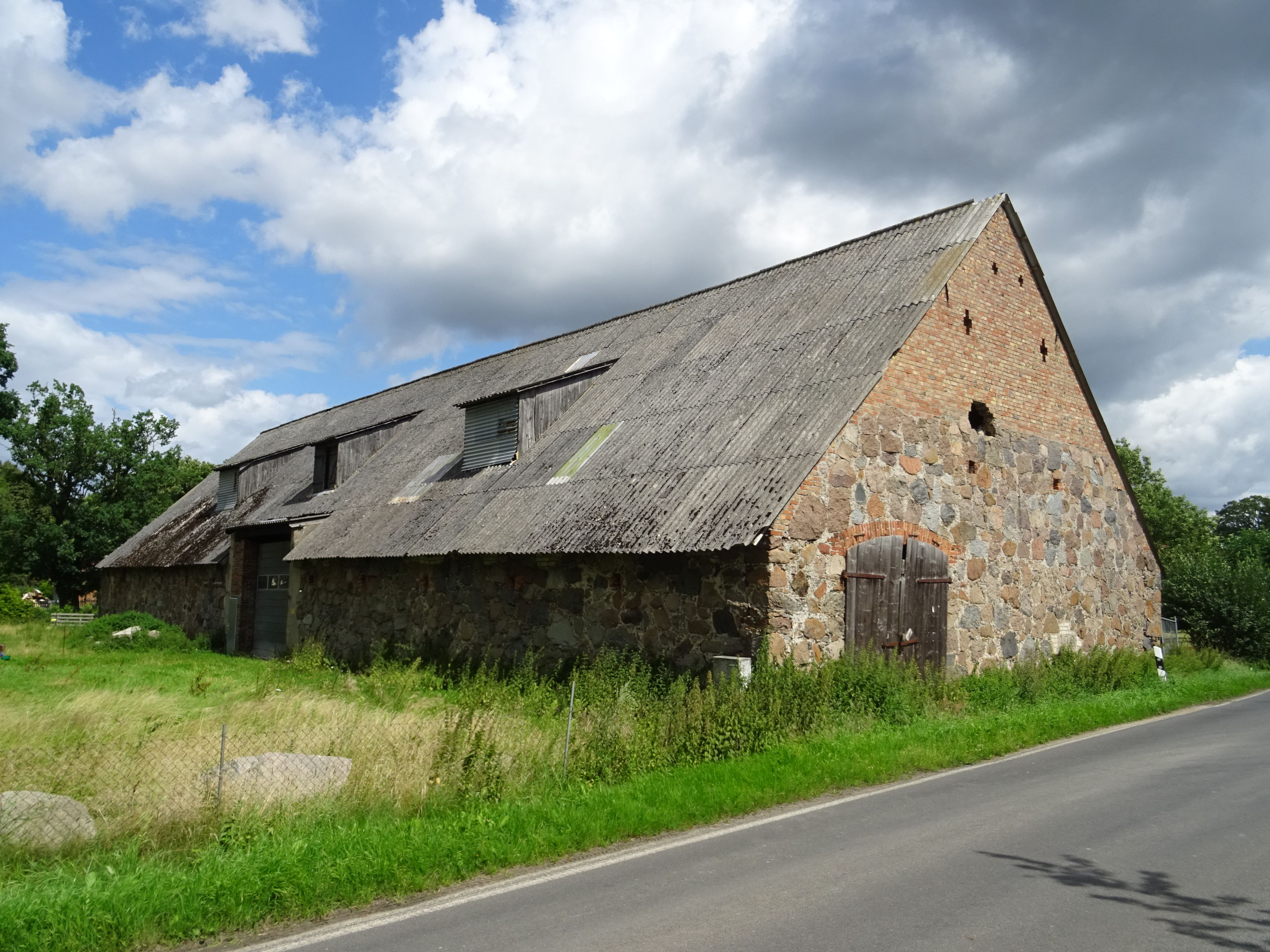 Nadelitz, denkmalgeschützte Gutsscheune